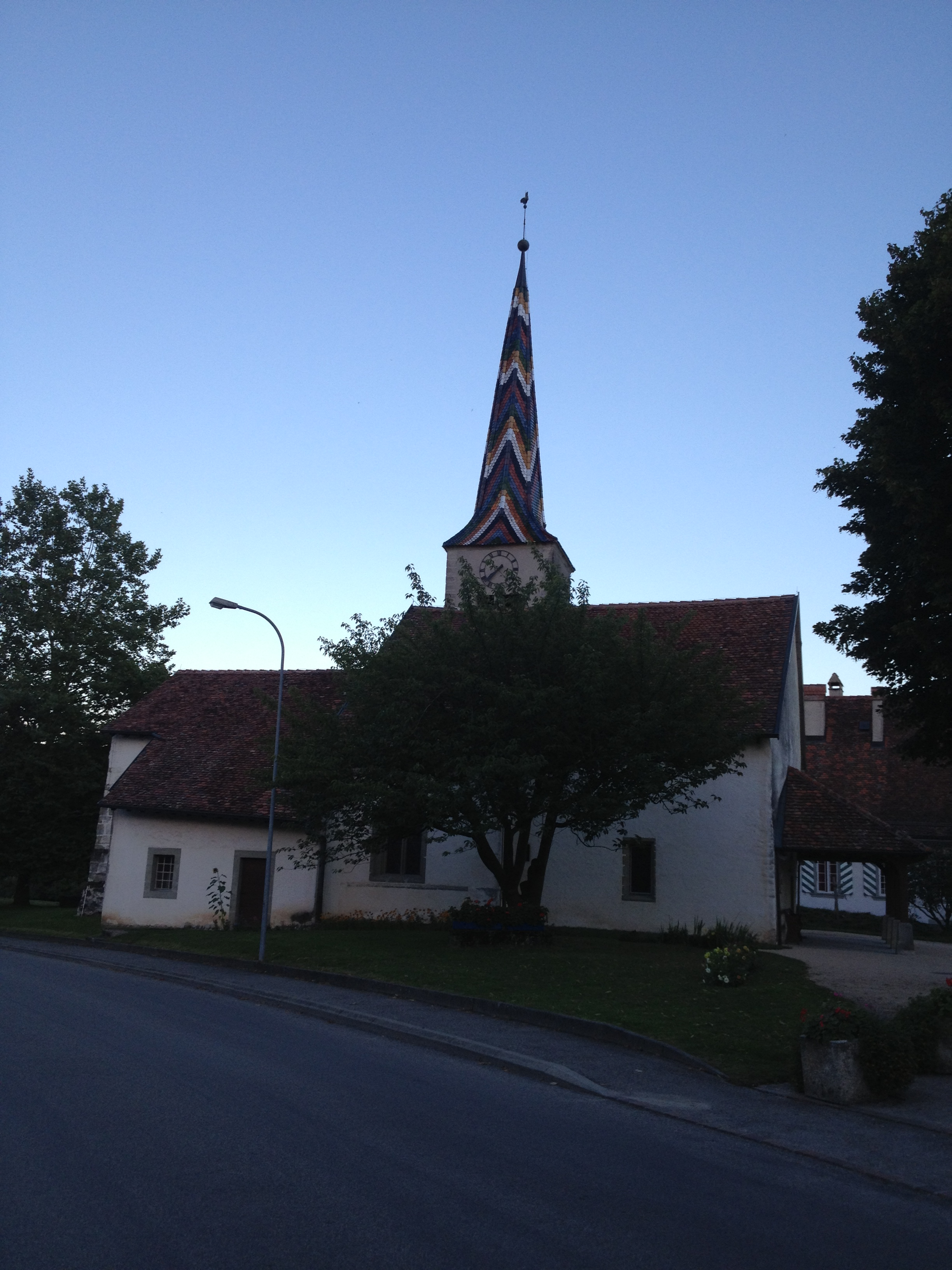 L'église de Granges-près-Marnand en Suisse.